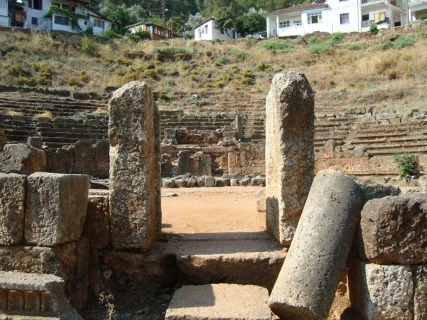 Telmessos Antik Tiyatrosu